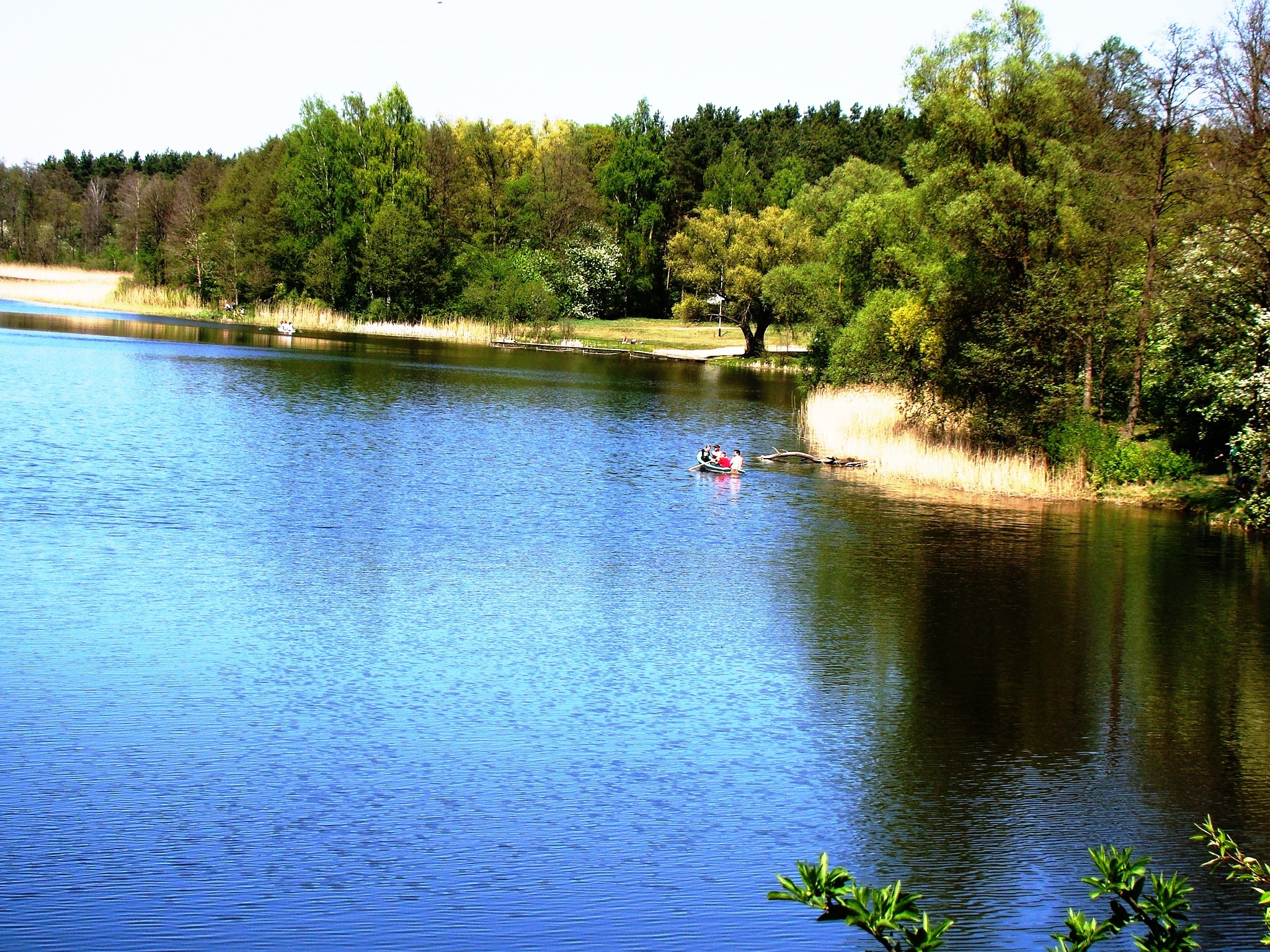 Stare juchy - jezioro Jędzelewo